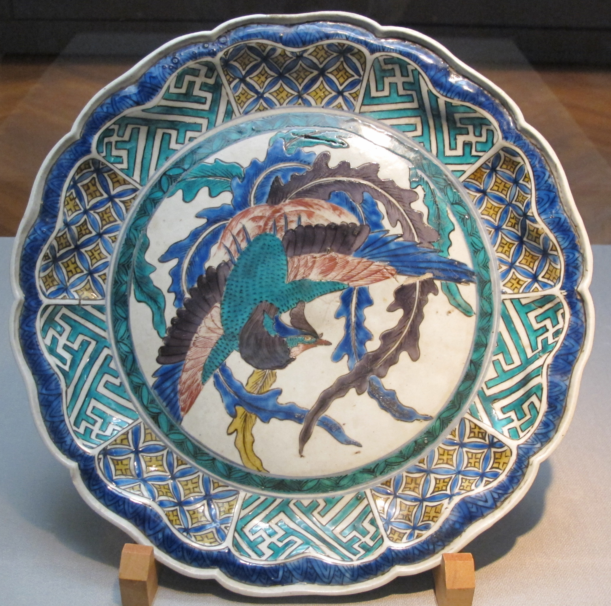 Periodo edo, grande piatto con fenice e decori vegetali, XVII sec